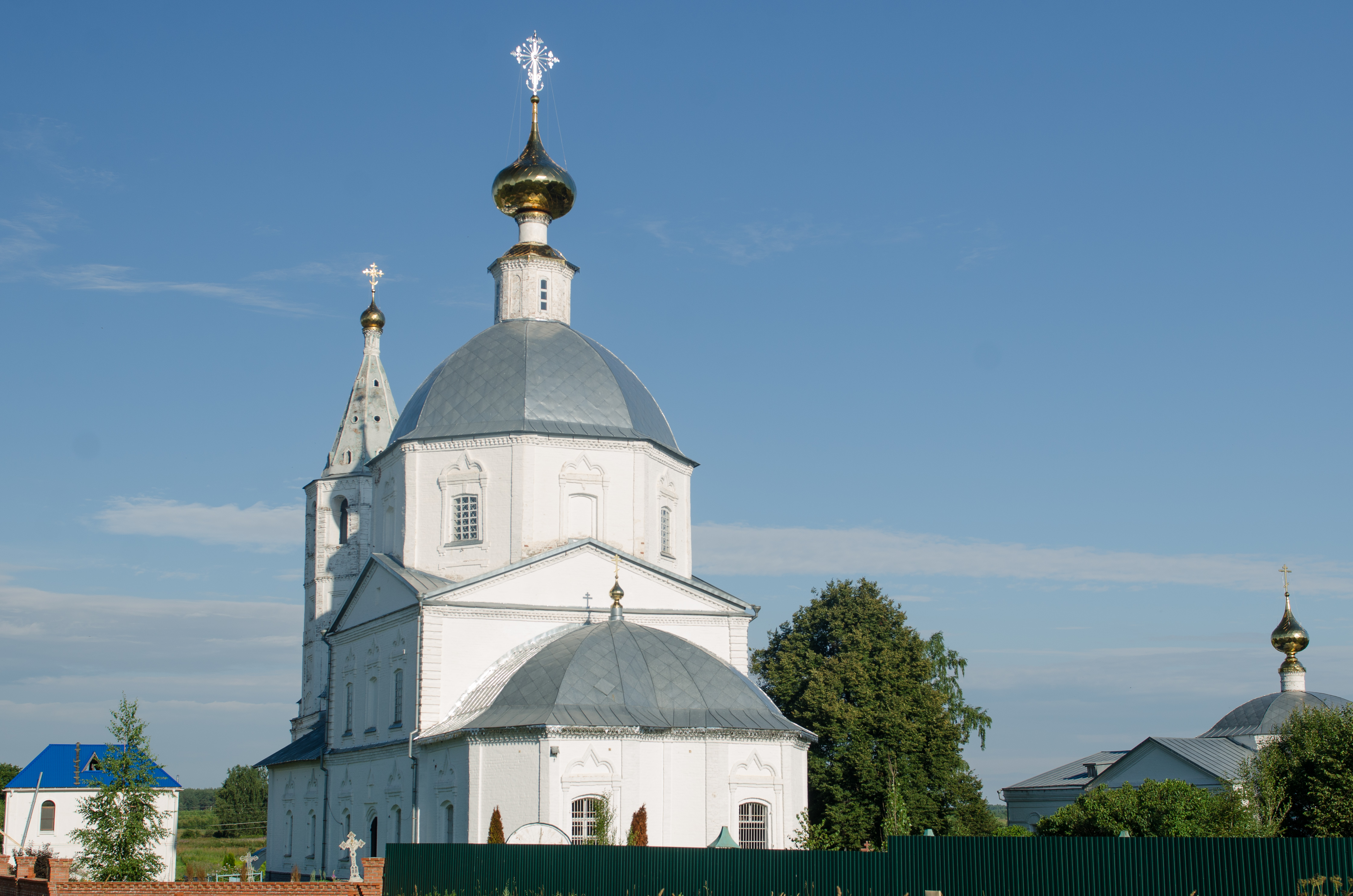 Храмовый комплекс: Санино, Суздальский район, Владимирская область